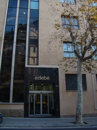 Fachada Editorial Edebé en Barcelona.